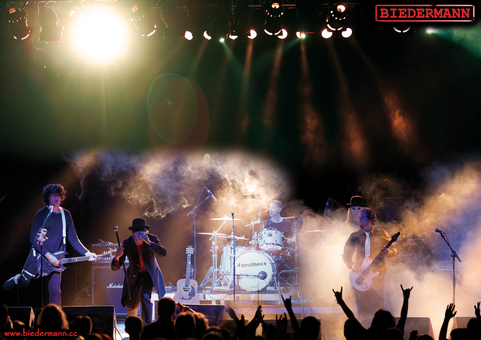 Live-Auftritt der Band Biedermann in der Arena Wien 2010.